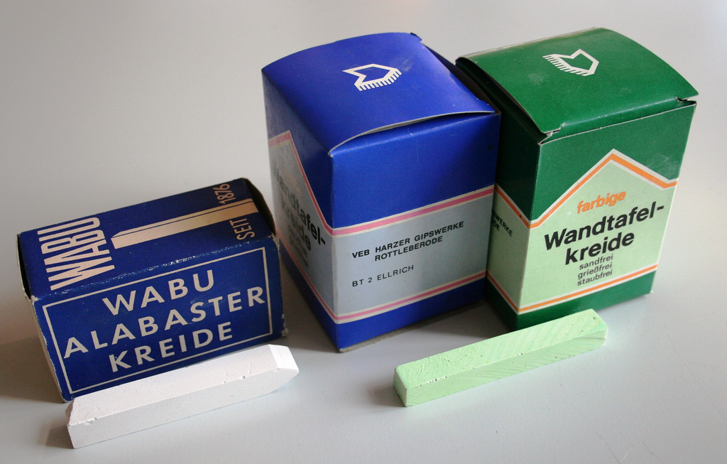 Schulkreide aus Gips, hergestellt von der WABU bzw. der VEB Südharzer Gipswerke.